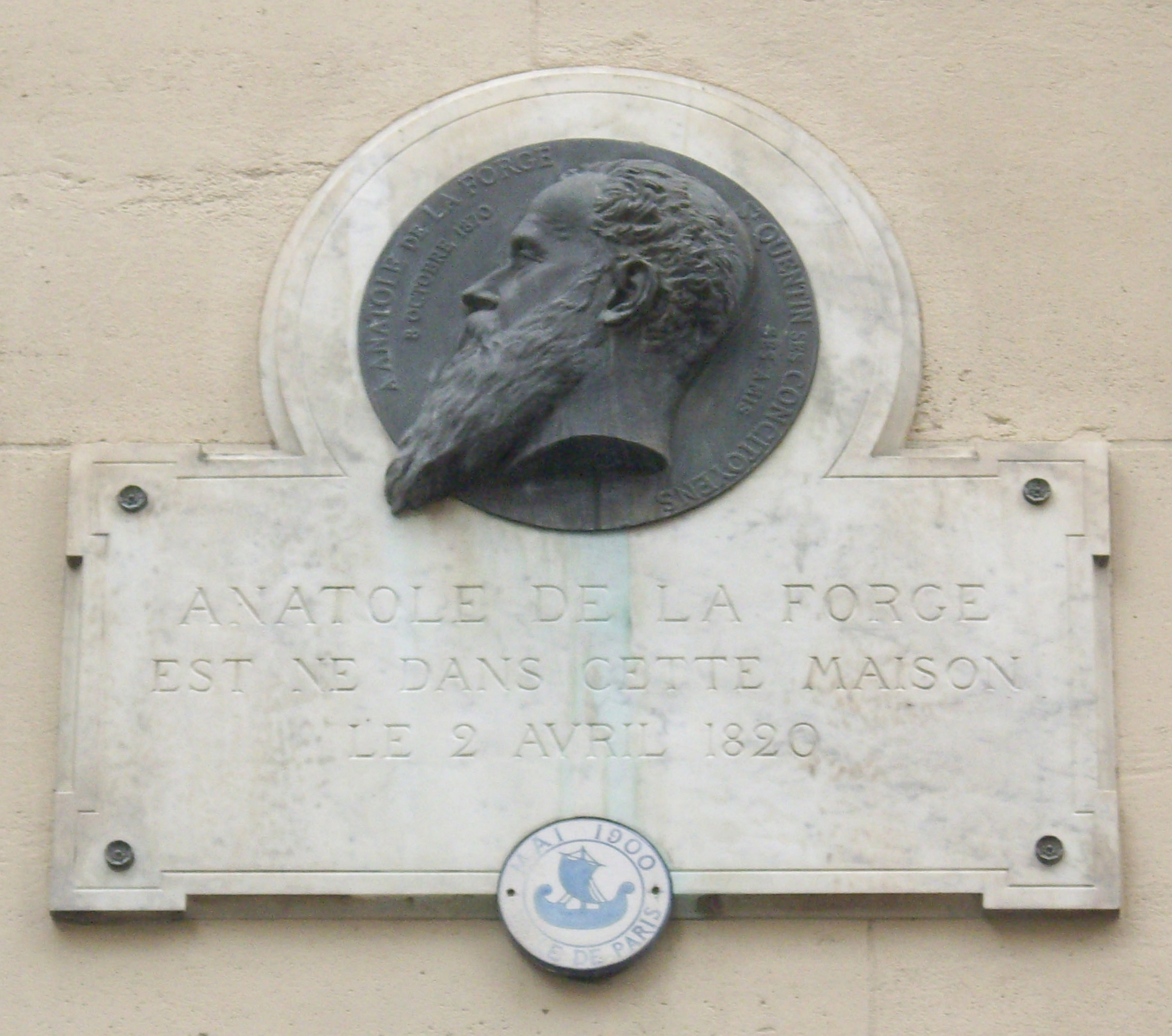 Plaque commémorative, 1 cité de Trévise, Paris 9e.Plaque : « Anatole de La Forge est né dans cette maison le 2 avril 1820. »Médaillon par Aimé Millet (1878) : « Anatole de La Forge, 8 octobre 1870. Saint-Quentin, ses concitoyens, ses amis. »